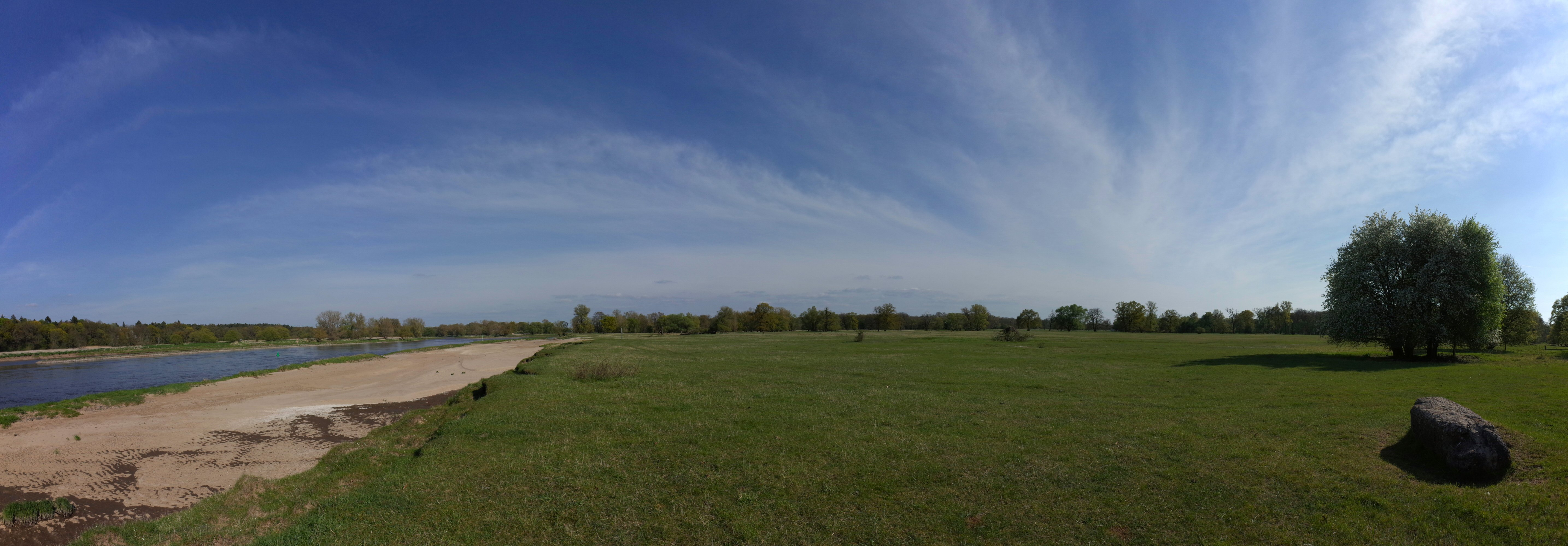 Oranienbaum-Wörlitz, Ortsteil Vockerode, Steinhornwiese an der Elbe. (Baudenkmal im Denkmalverzeichniss Sachsen-Anhalt, Erfassungsnummer: 094 40625 000 000 000 000 [1])